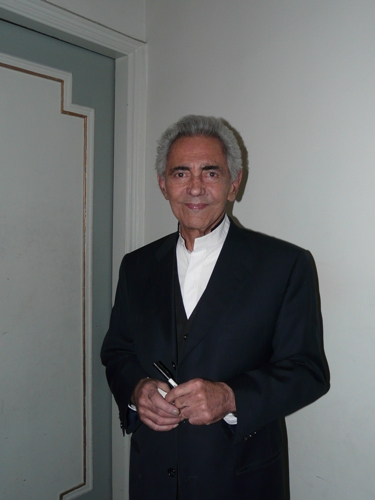 bose bar zakhamehaye por ehsasash...